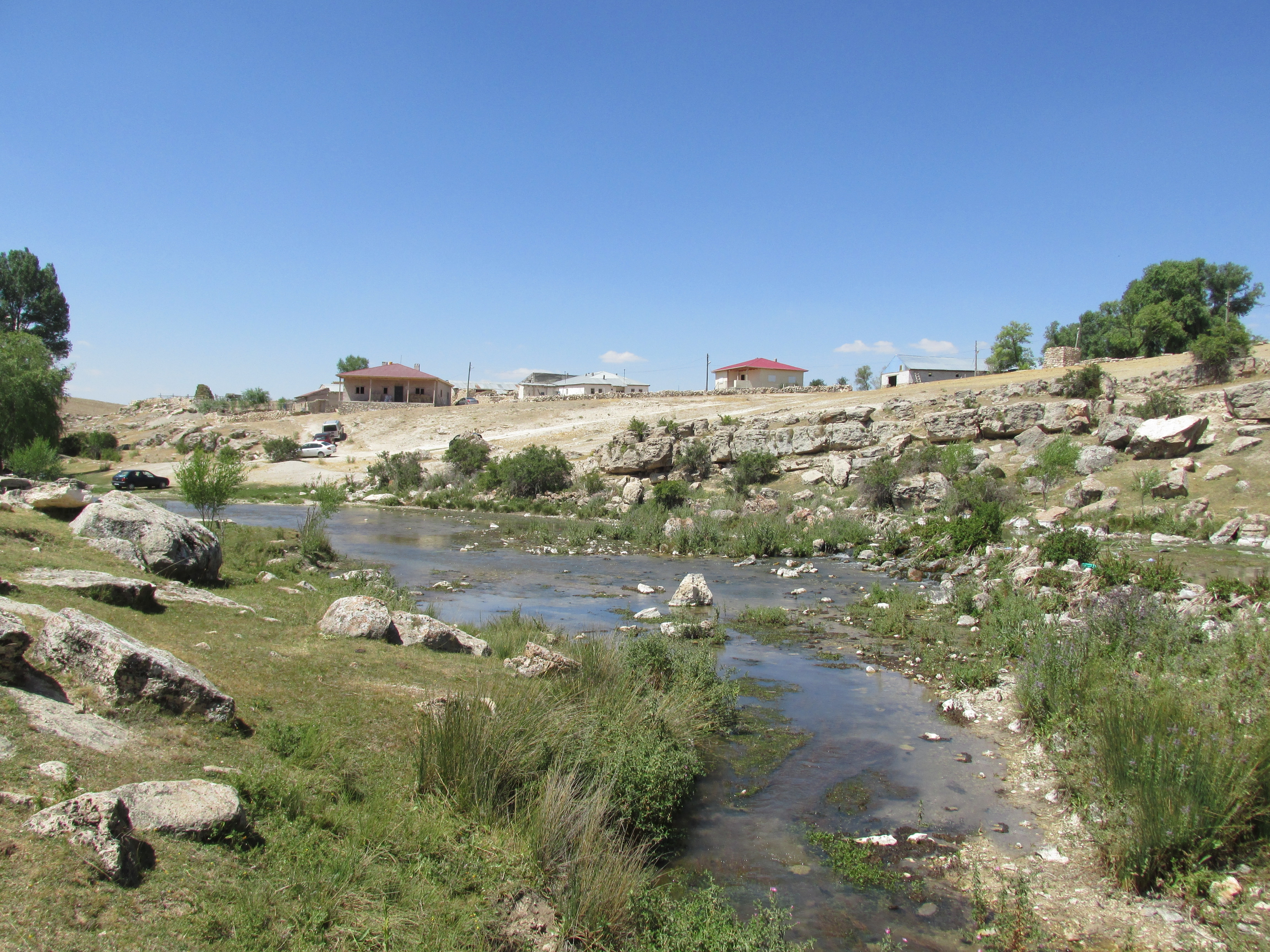 Kayseri Pınarbaşı Şerefiye Mahallesi (Köyü)